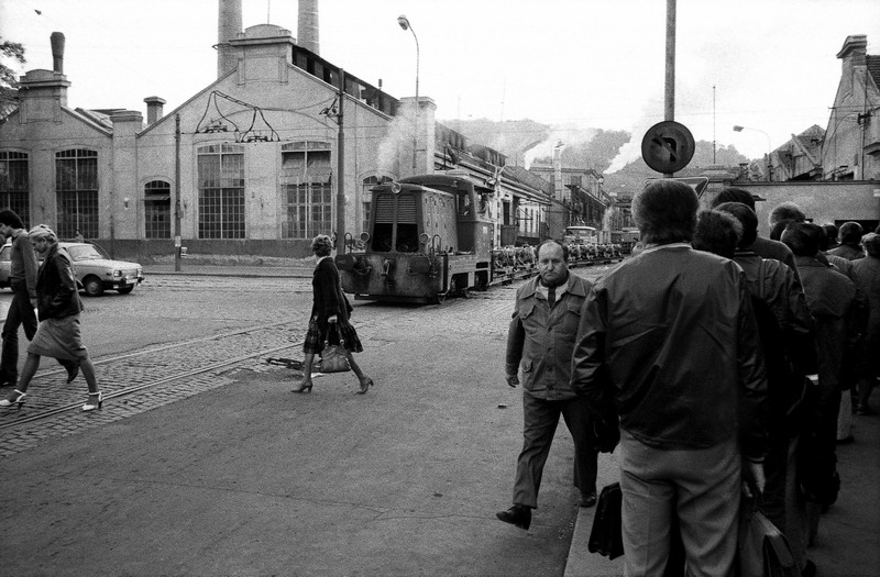 Před Tatrou mašina a fronta.